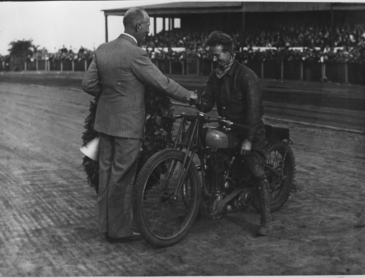 Nordisk Jordbanemesterskab 1934 Amager Travbane